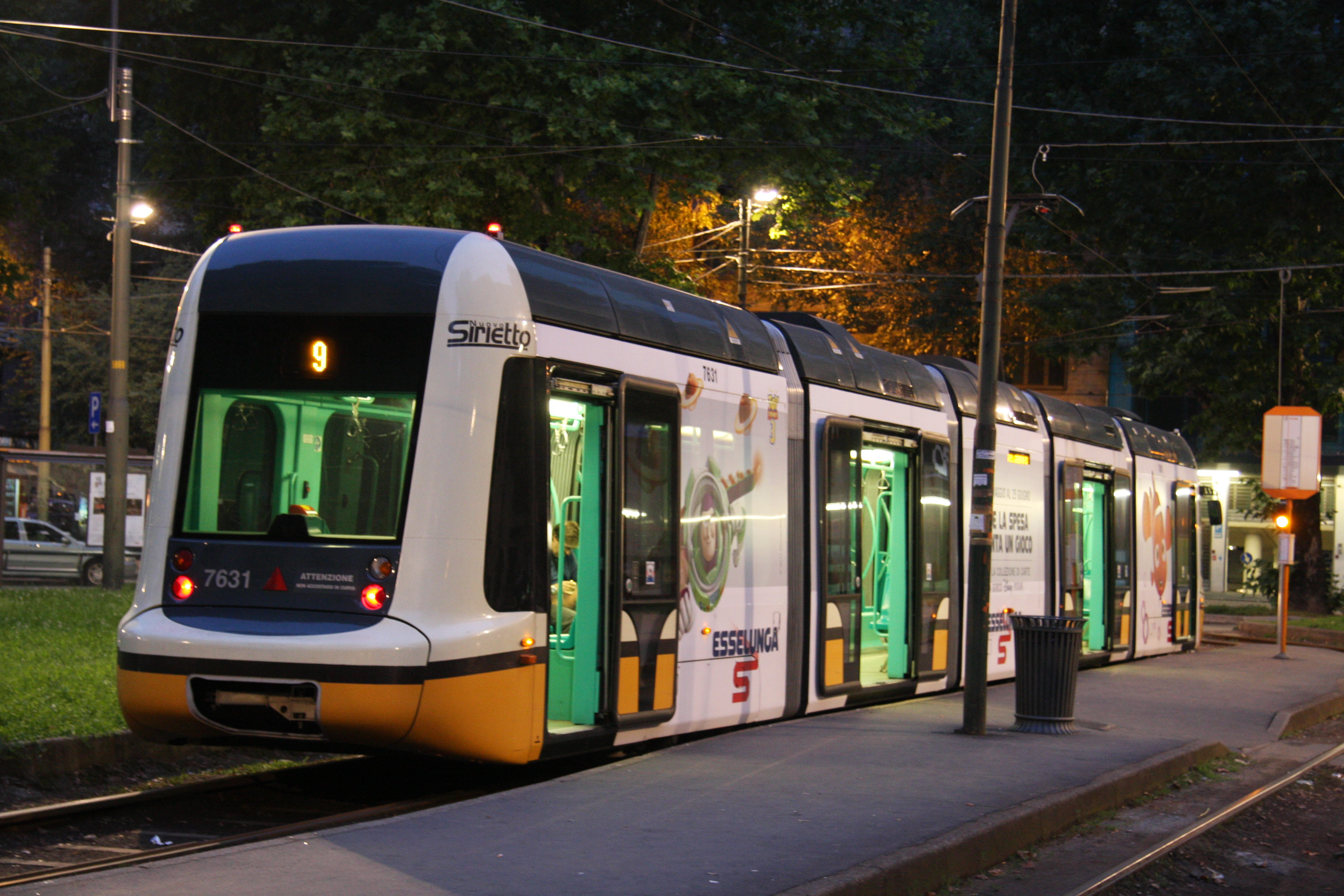 Vettura tranviaria serie 7600 di Milano in sosta al capolinea di piazza IV Novembre